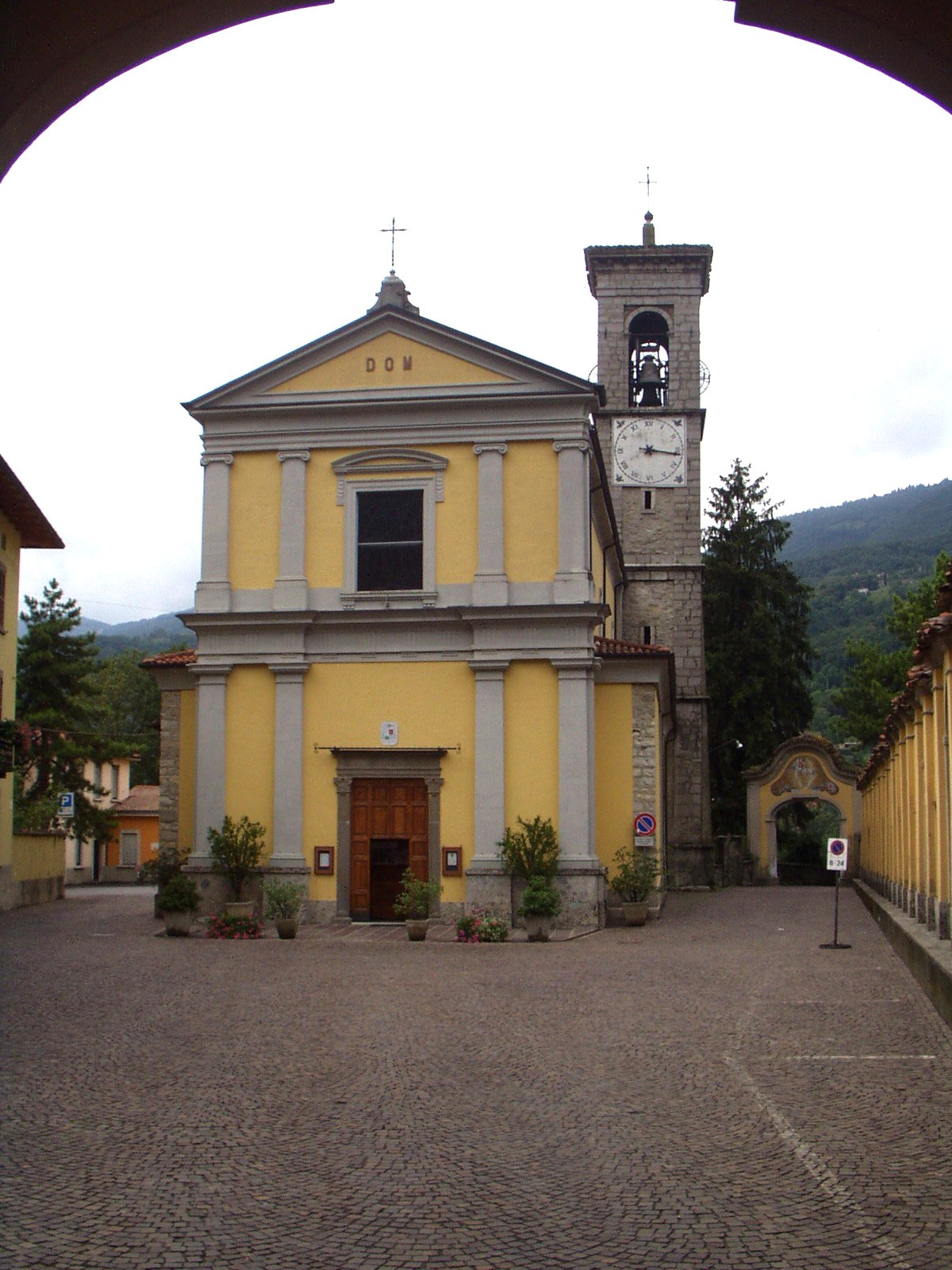 Monasterolo del Castello chiesa di San Salvatore